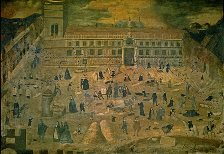 1649- PINTURA BARROCA Obra de ANONIMO